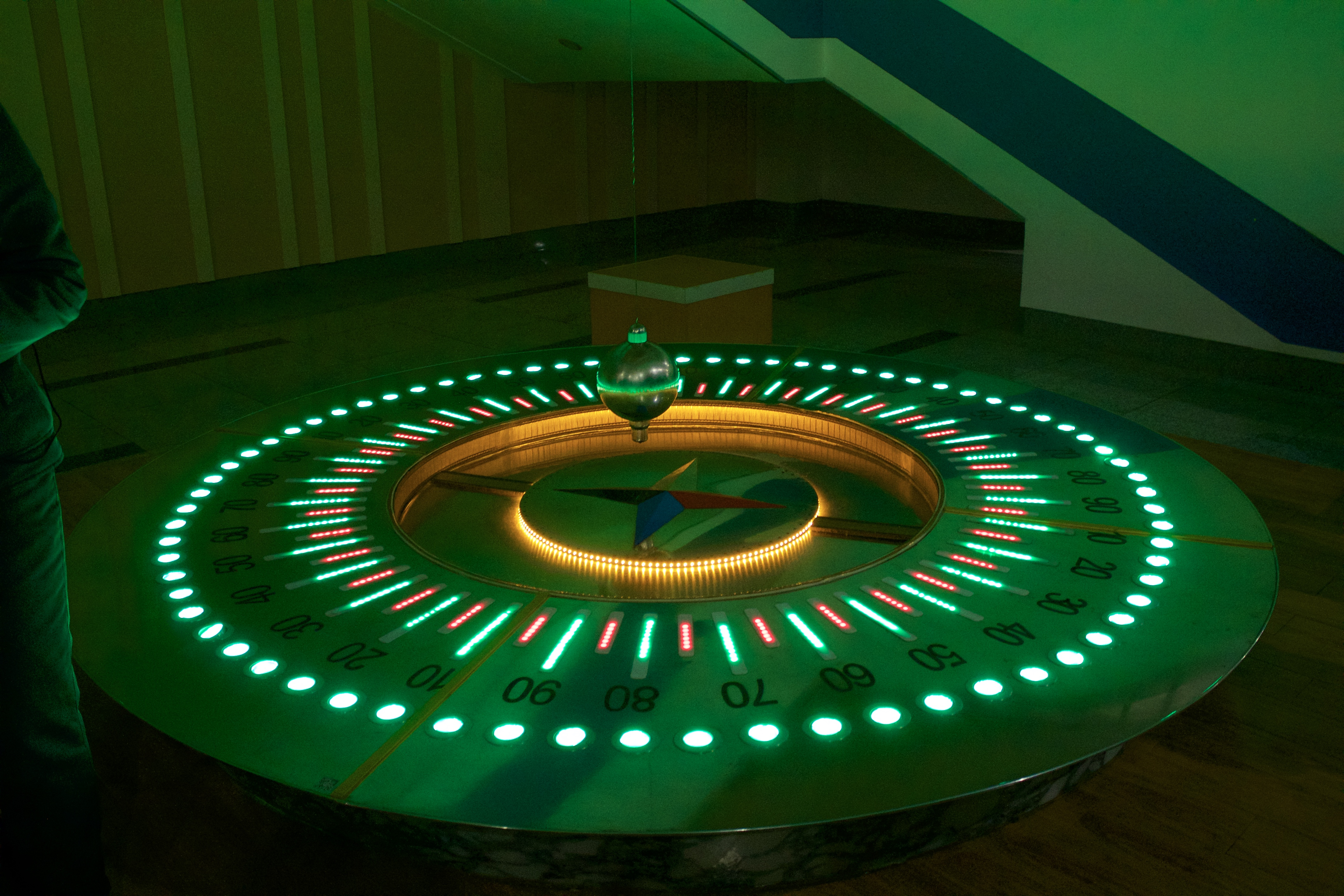 Pyongyang Sci Tech Center